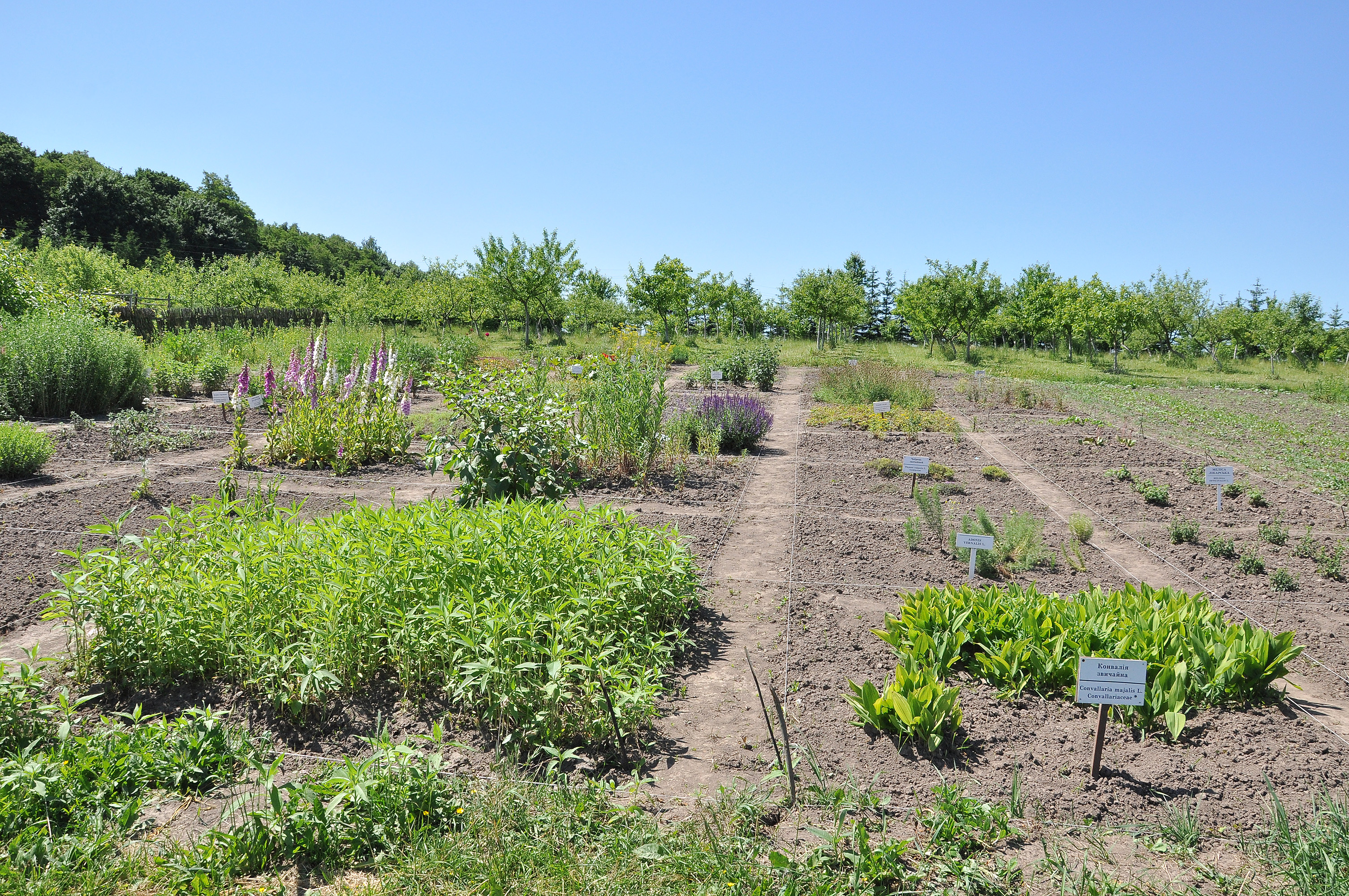 «Червона калина» — ботанічний сад місцевого значення поблизу смт Дружба Теребовлянського району Тернопільської області, поруч із Львівською залізницею на території навчально-оздоровчого комплексу «Червона калина» Тернопільського державного медичного університету. Дослідна ділянка.